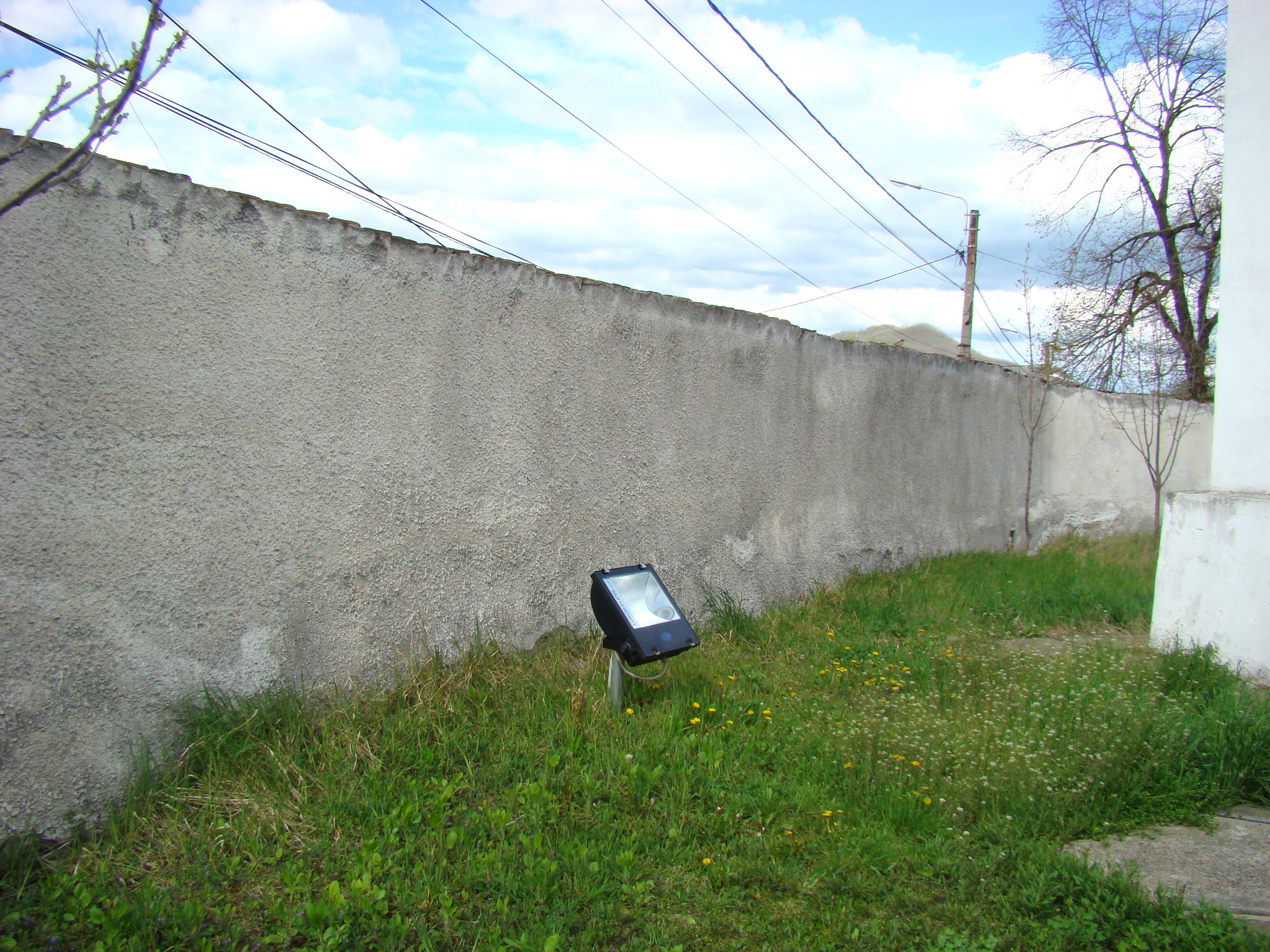 Zid-incintă,biserica evanghelică, oraș Copșa Mică, str. Mediașului 100 02